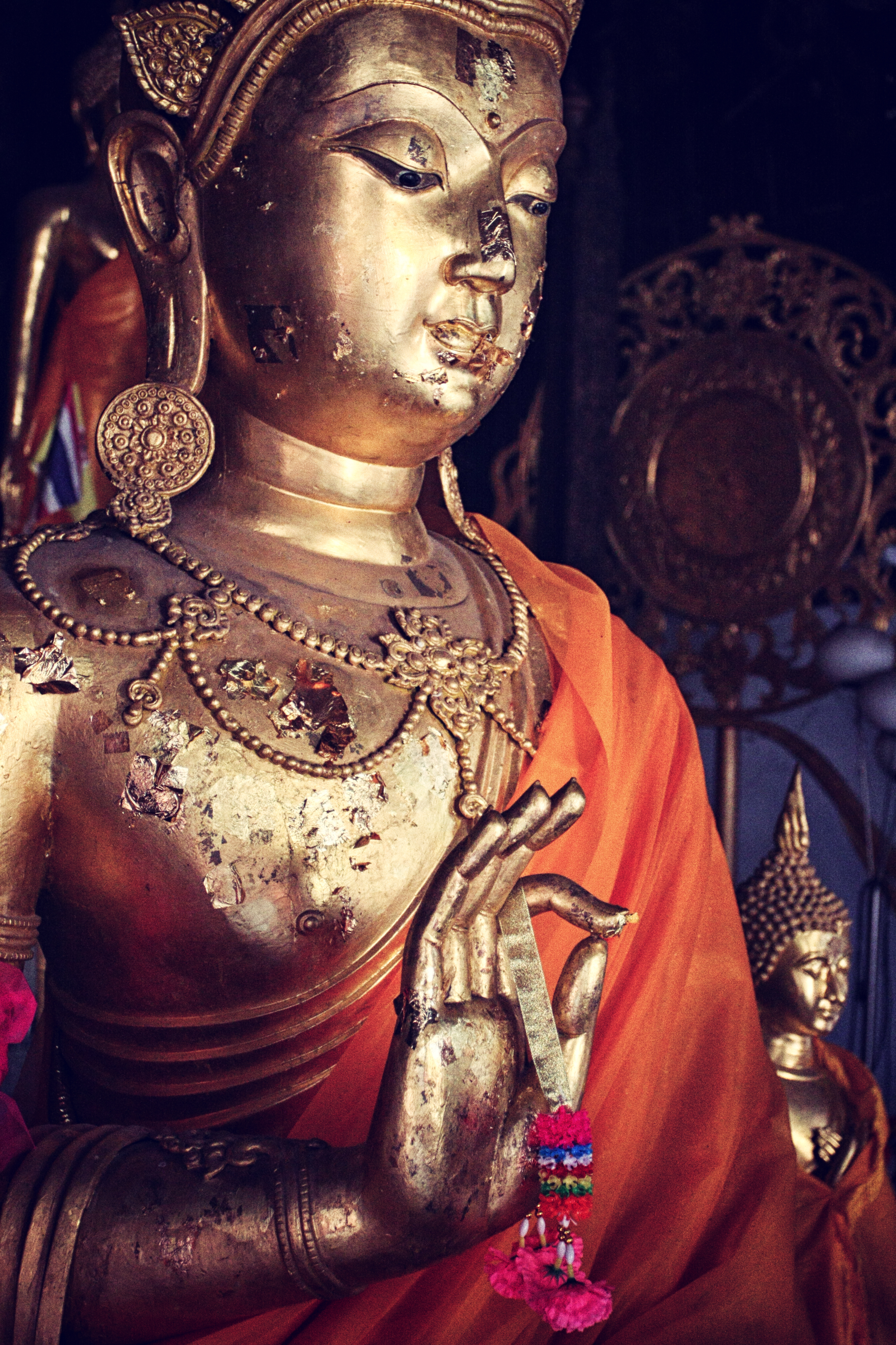 วัดพระธาตุหริภุญชัย